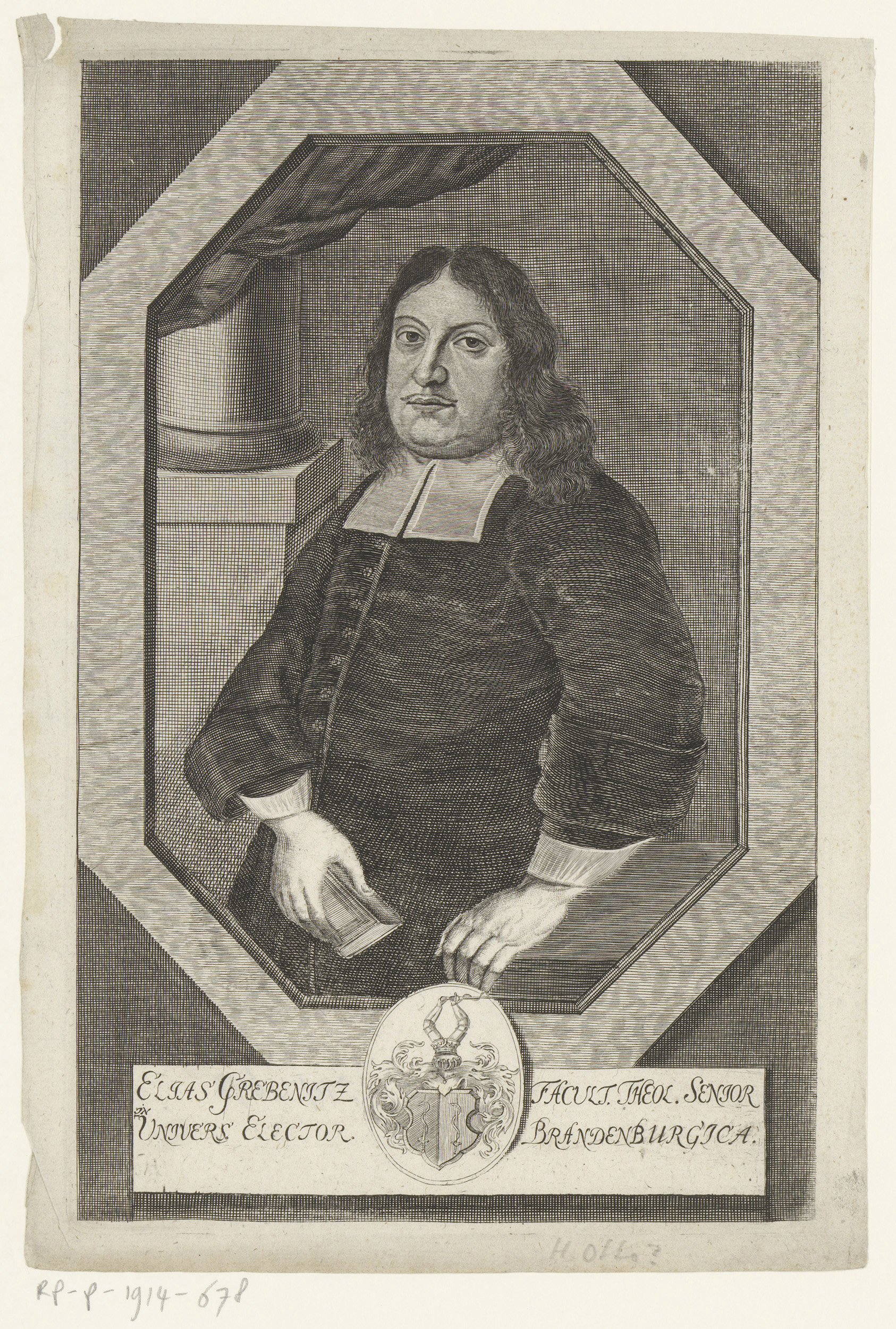 IdentificatieTitel(s): Portret van Elias GrebenitzObjecttype: prent Objectnummer: RP-P-1914-678Catalogusreferentie: HAB A 8131Opschriften / Merken: verzamelaarsmerk, verso, gestempeld: Lugt 2228VervaardigingVervaardiger: prentmaker: Heinrich Jakob Otto (vermeld op object)Datering: 1650 - 1749Fysieke kenmerken: gravureMateriaal: papier Techniek: graveren (drukprocedé)Afmetingen: plaatrand: h 286 mm × b 184 mmOnderwerpWat: historical personsWie: Elias GrebenitzVerwerving en rechtenVerwerving: aankoop 1905Copyright: Publiek domein